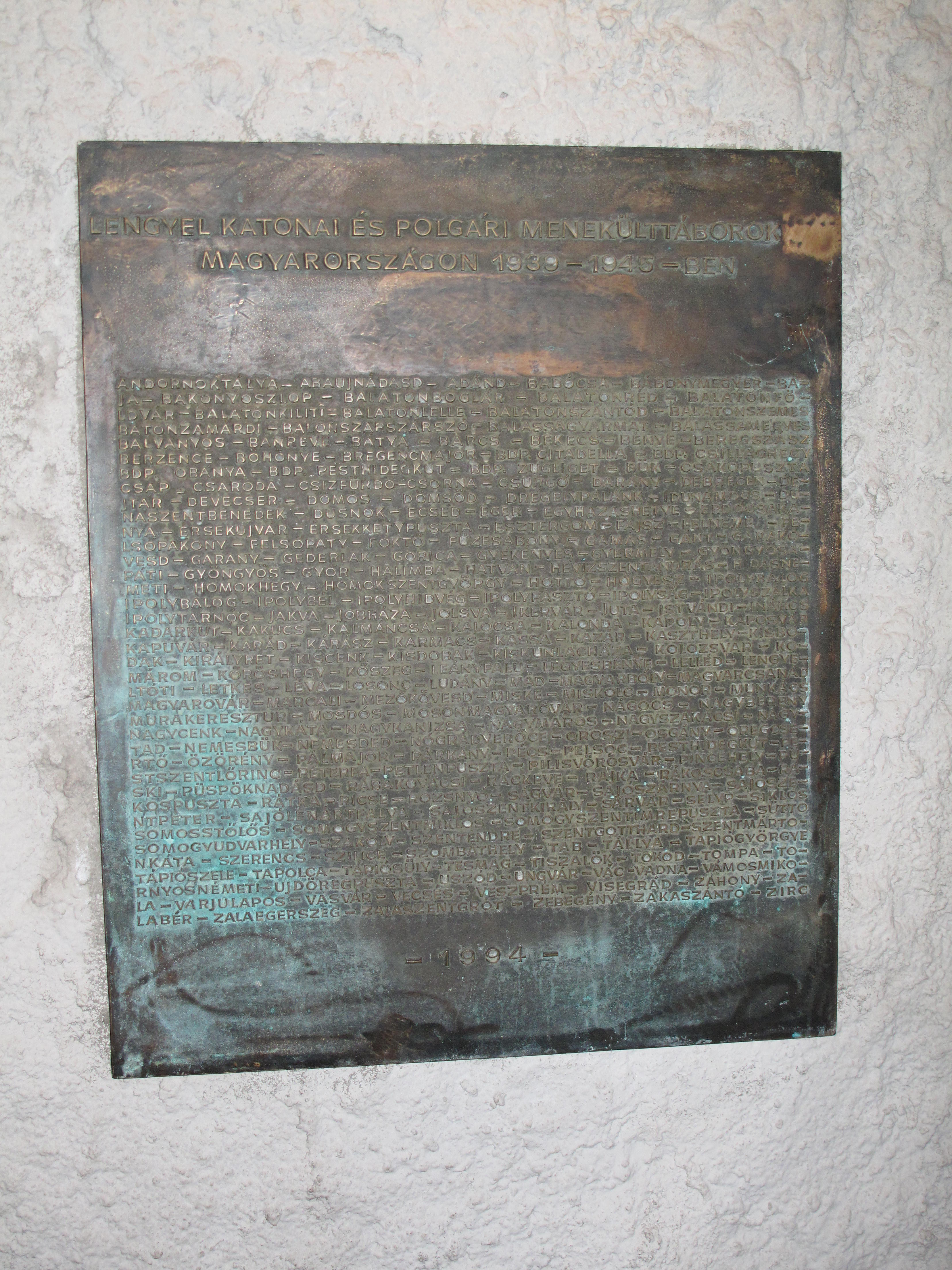 BudapešťLengyel katonai és polgári menekülttáborok tábla a Gellért sziklatemplomban?